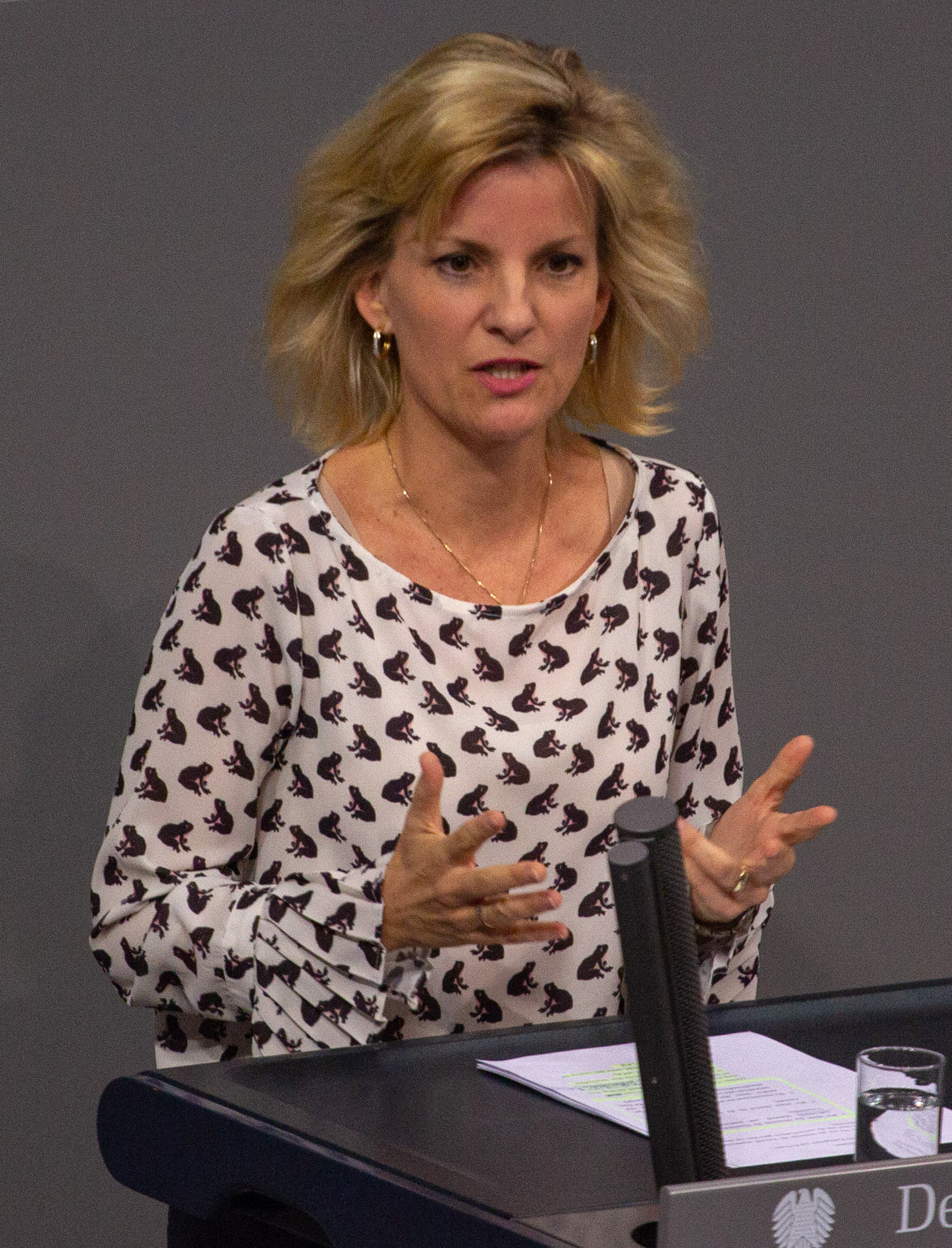 Daniela Ludwig, Mitglied des Deutschen Bundestages, während einer Plenarsitzung am 11. April 2019 in Berlin.